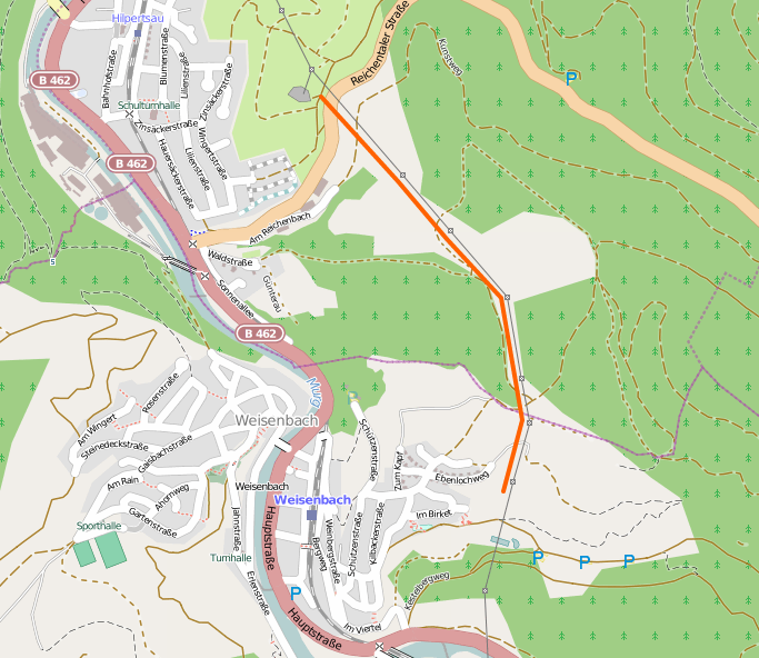 Verlauf der Kompaktfreileitung Hilpertsau-Weisenbach, erstellt mit Hilfe von "Openstreetmap"